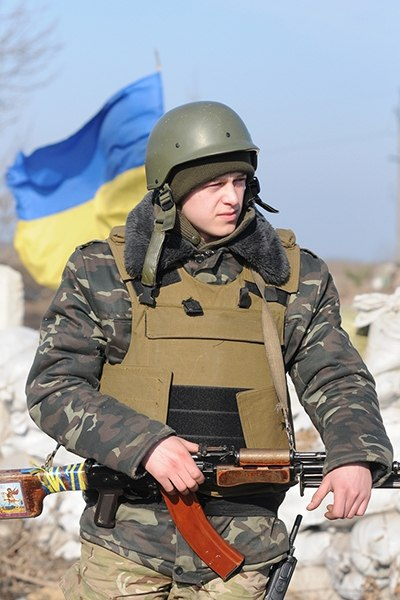 ENr0DB_Xfbo